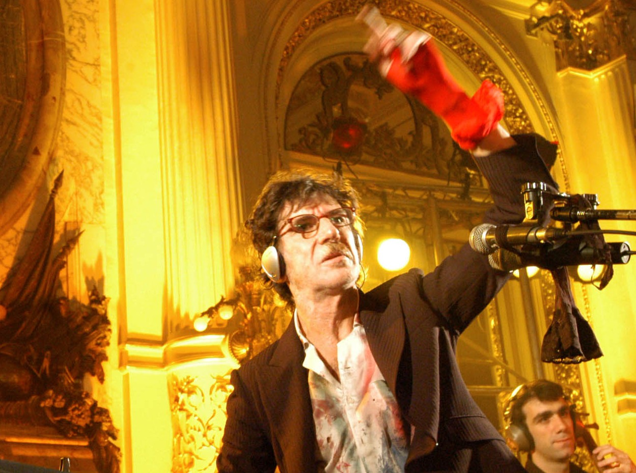 Charly García. En la Casa Rosada. Buenos Aires. Argentina. 3 de junio de 2005. foto oficial